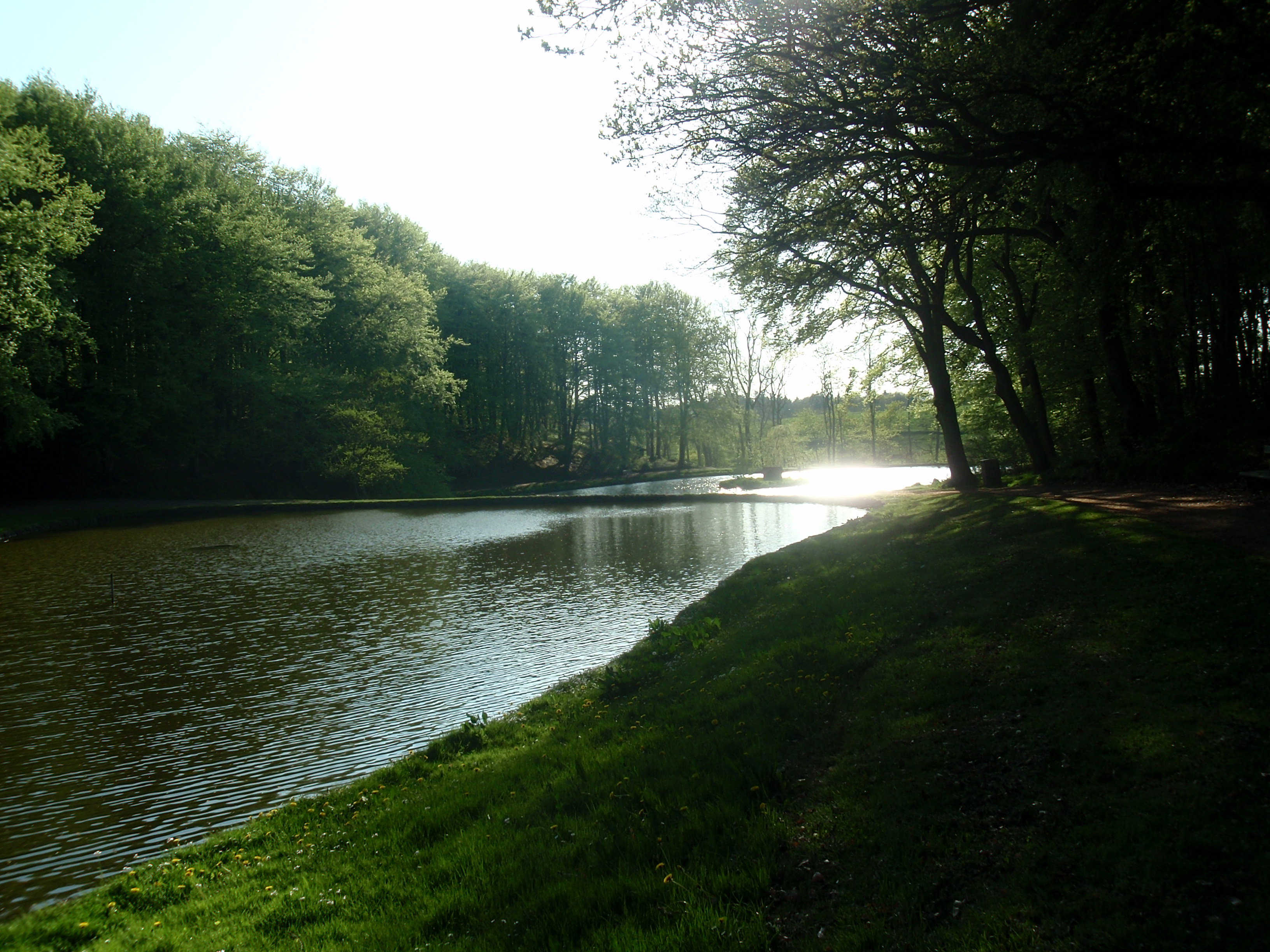 Sct. Knuds Kilde, Hjørring